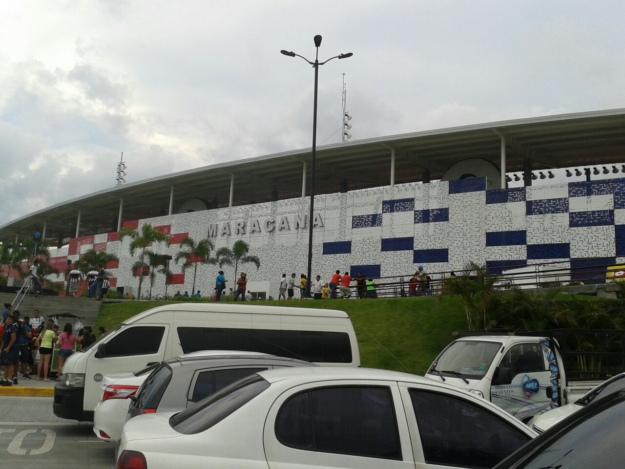 Estadio Maracaná, ciudad de Panamá.